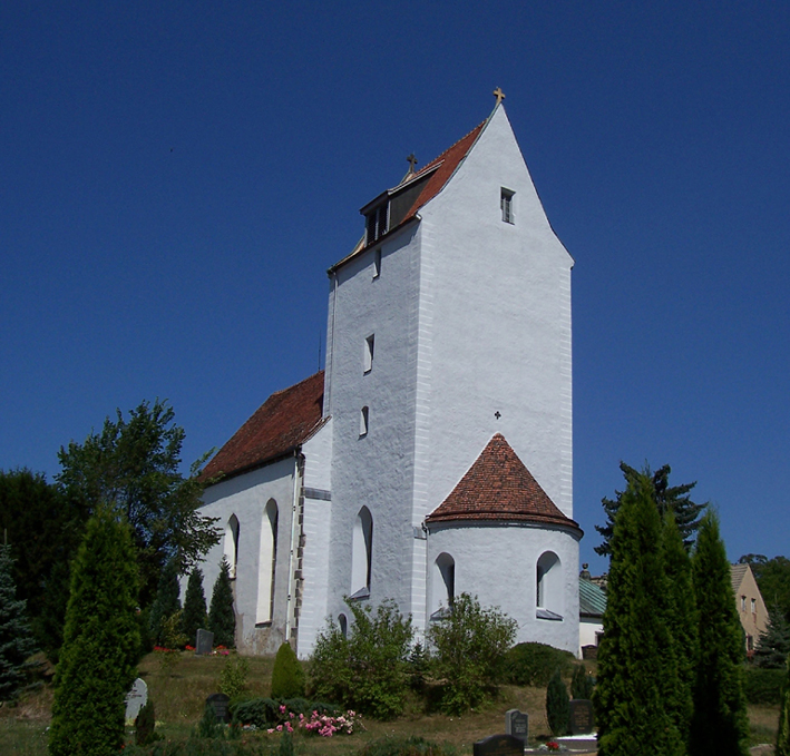 Kirche Ludwigsdorf (Neiße), Ansicht von Südwesten